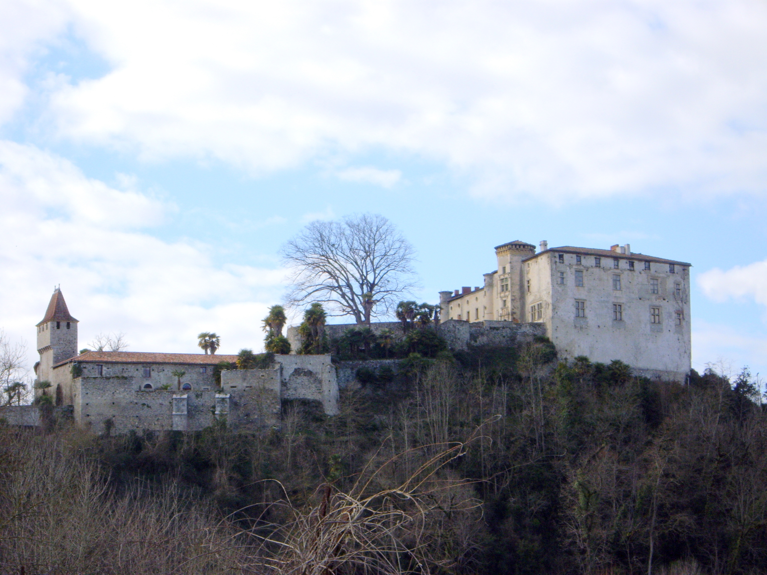 Château de Prat (Prat-Bonrepaux, Ariège, France).